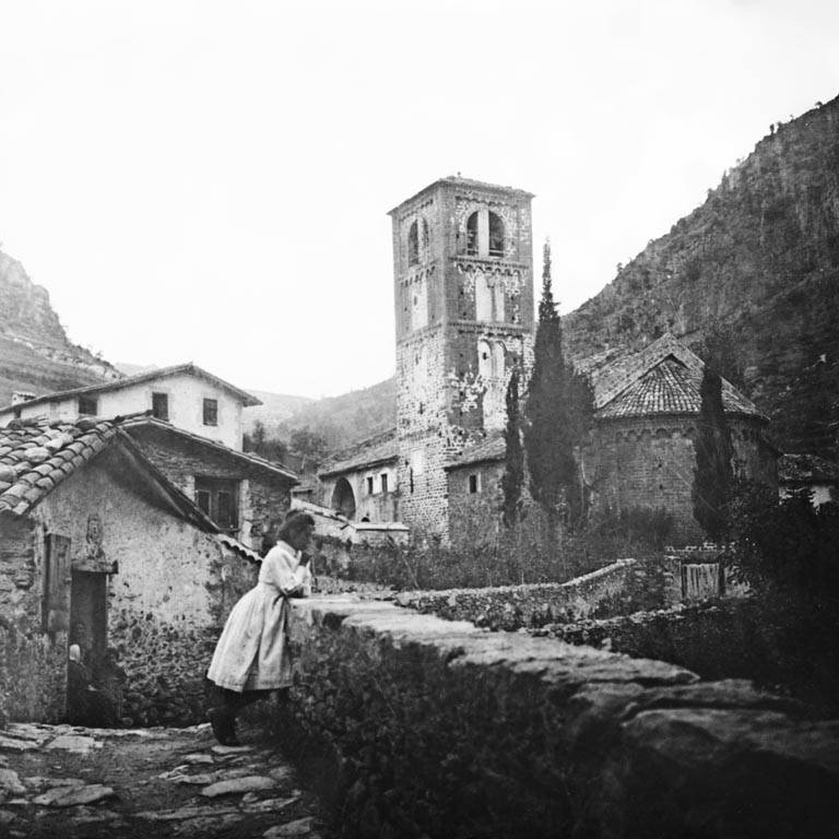 Sant Cristòfol de Beget. Cèsar August Torras i Ferreri (ca. 1910)